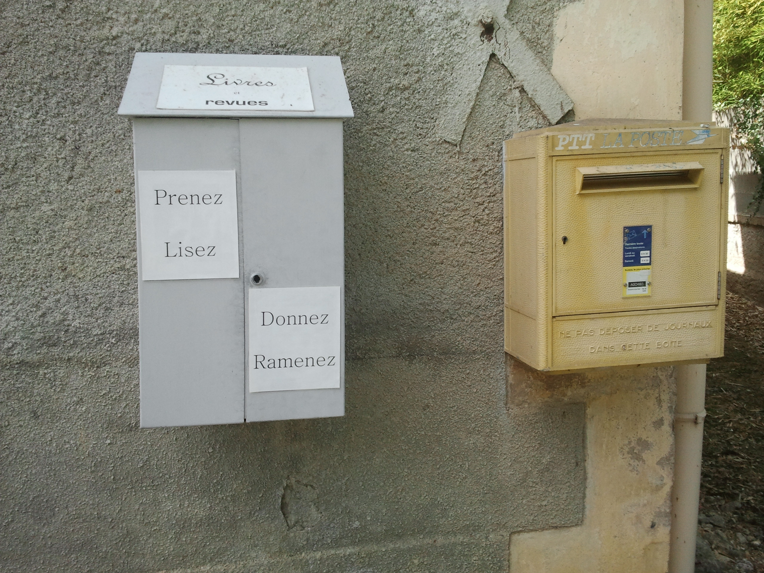 Boîte à livres et boîte aux lettres à Boucagnères (Gers, France).